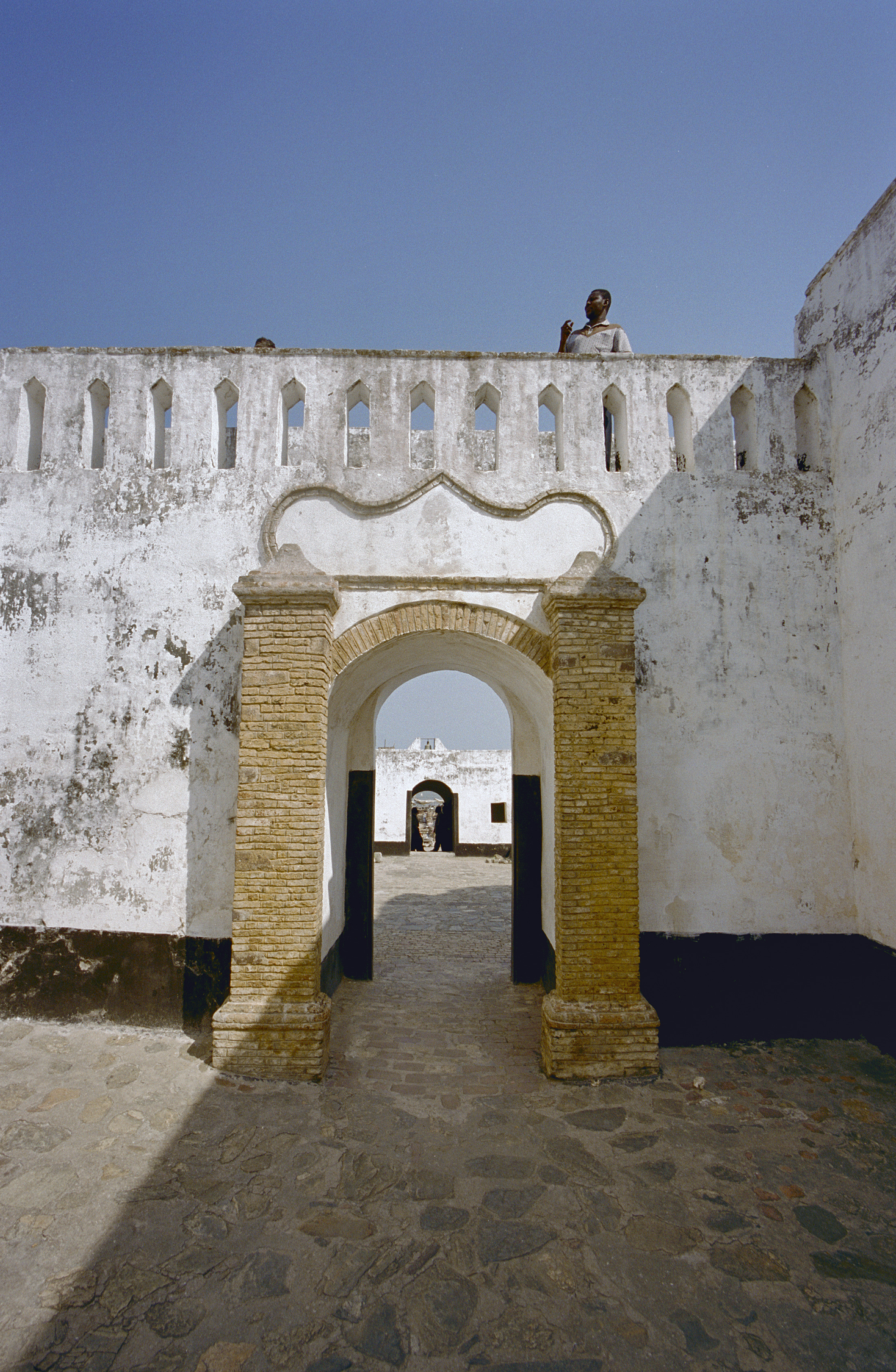 Fort Saint Sebastian: Overzicht poort naar voorste gedeelte fort met zicht op poort naar de trappartij (opmerking: Ghana reis Loek Tangel)